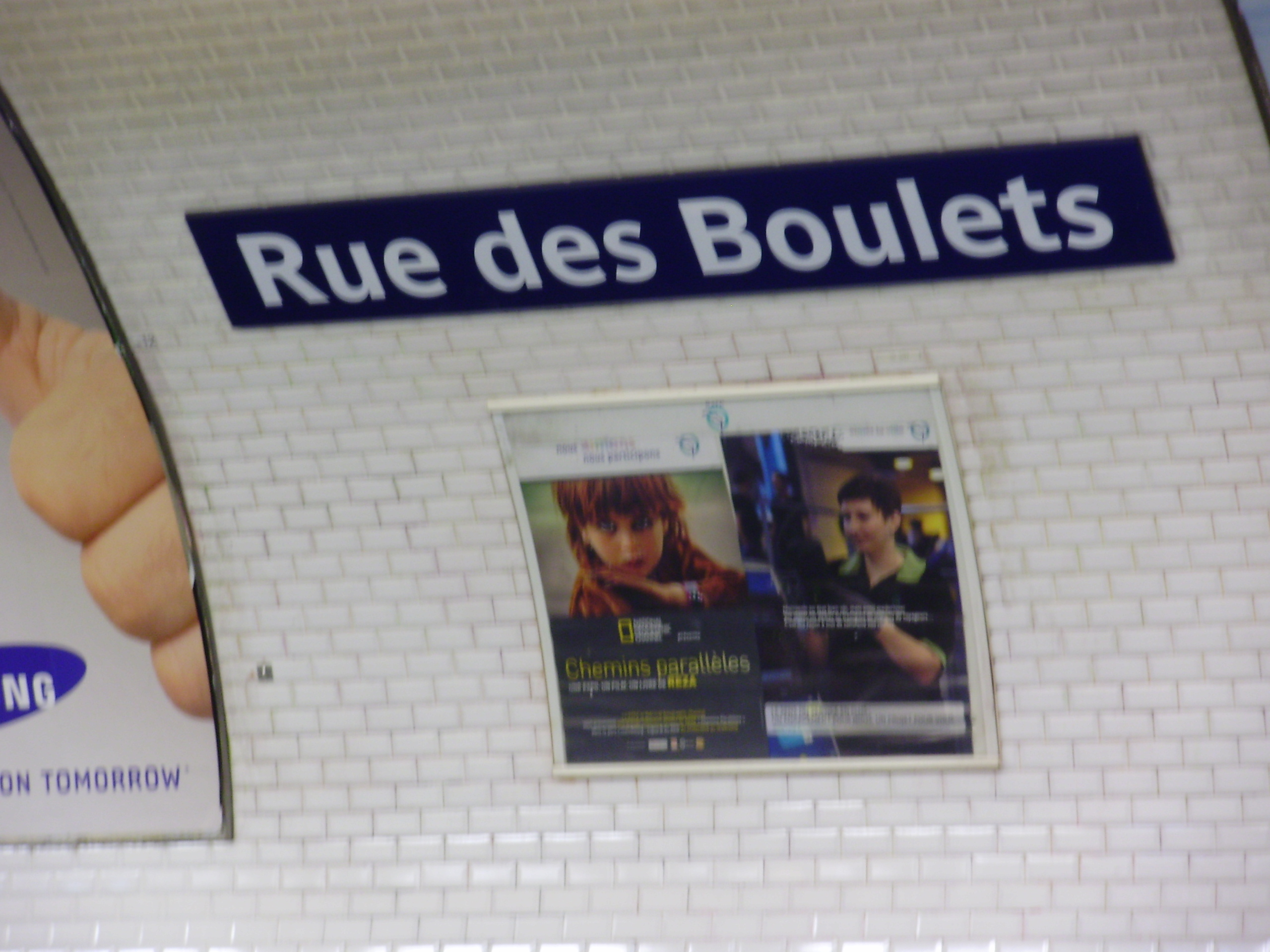 Plaque portant le nom de la station « Rue des Boulets » du métro de Paris